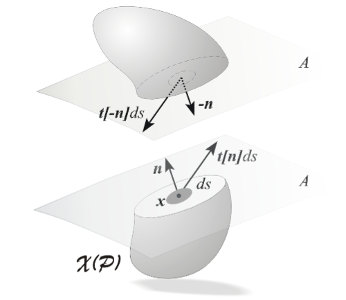 Forze di contatto nel continuo di Cauchy